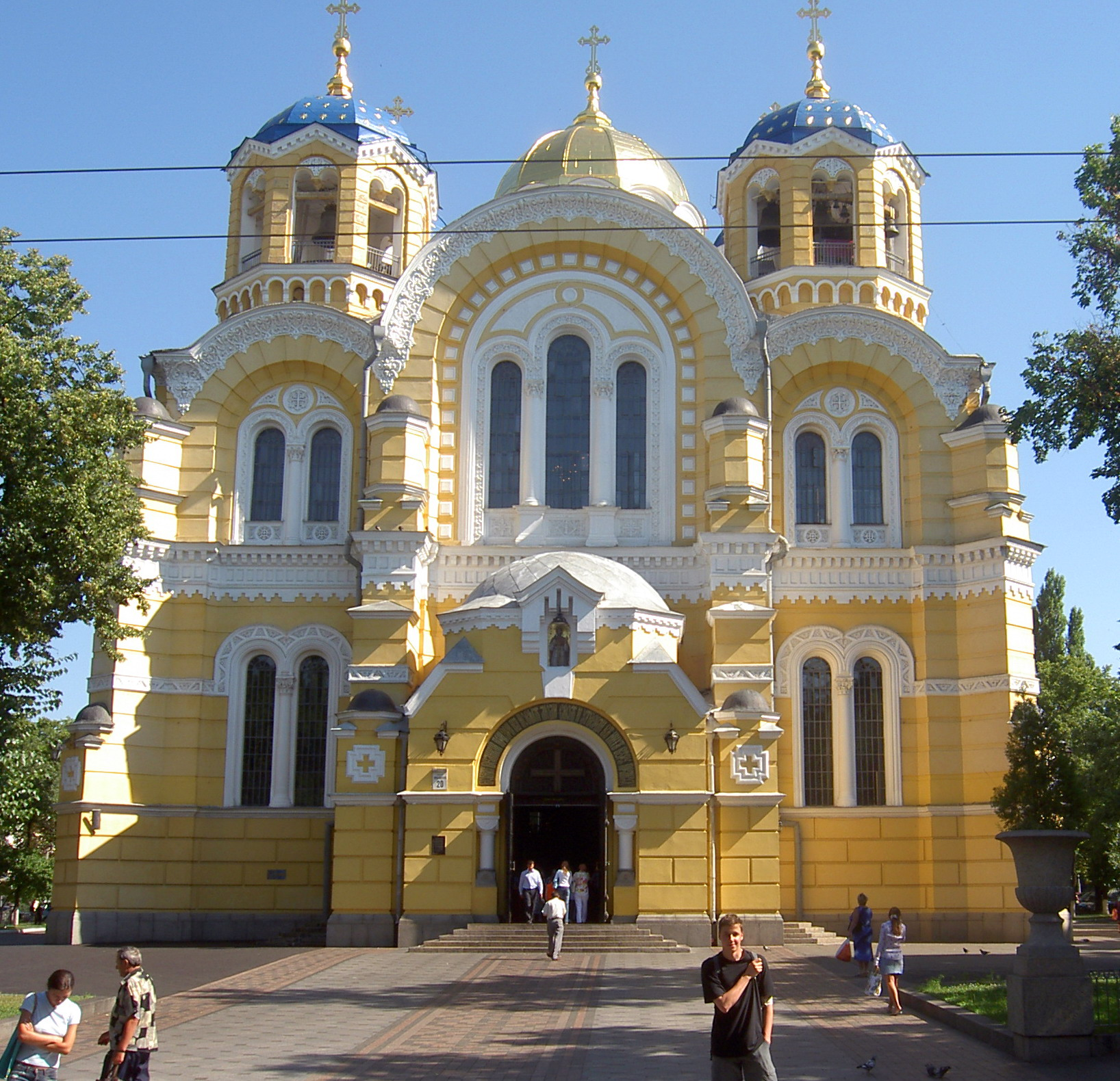 Chrám svatého Vladimíra, Kyjev